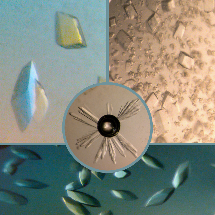 Erinevate ainete lahustes võivad valgud moodustada erineva suuruse ja kujuga kristalle. 50x suurendus.